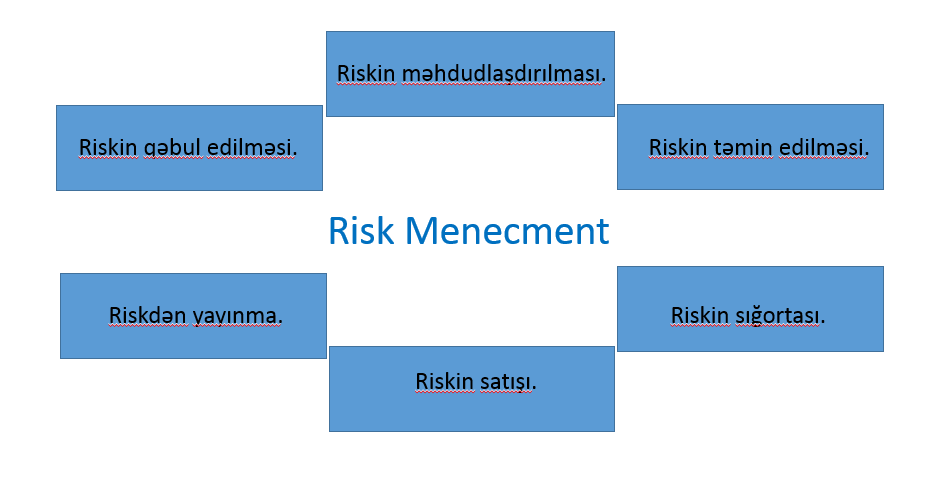 Risk menecment 2